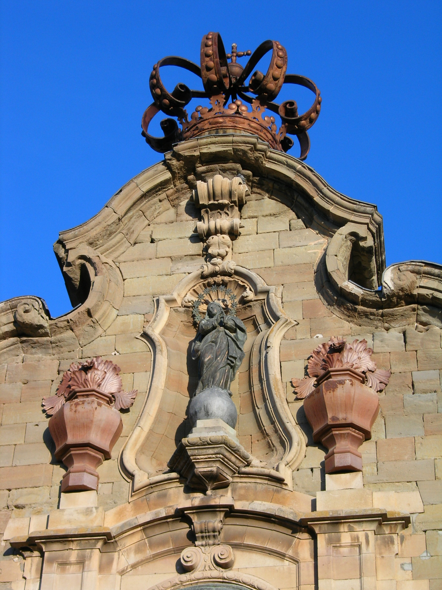 Edifici de la Universitat (Cervera)